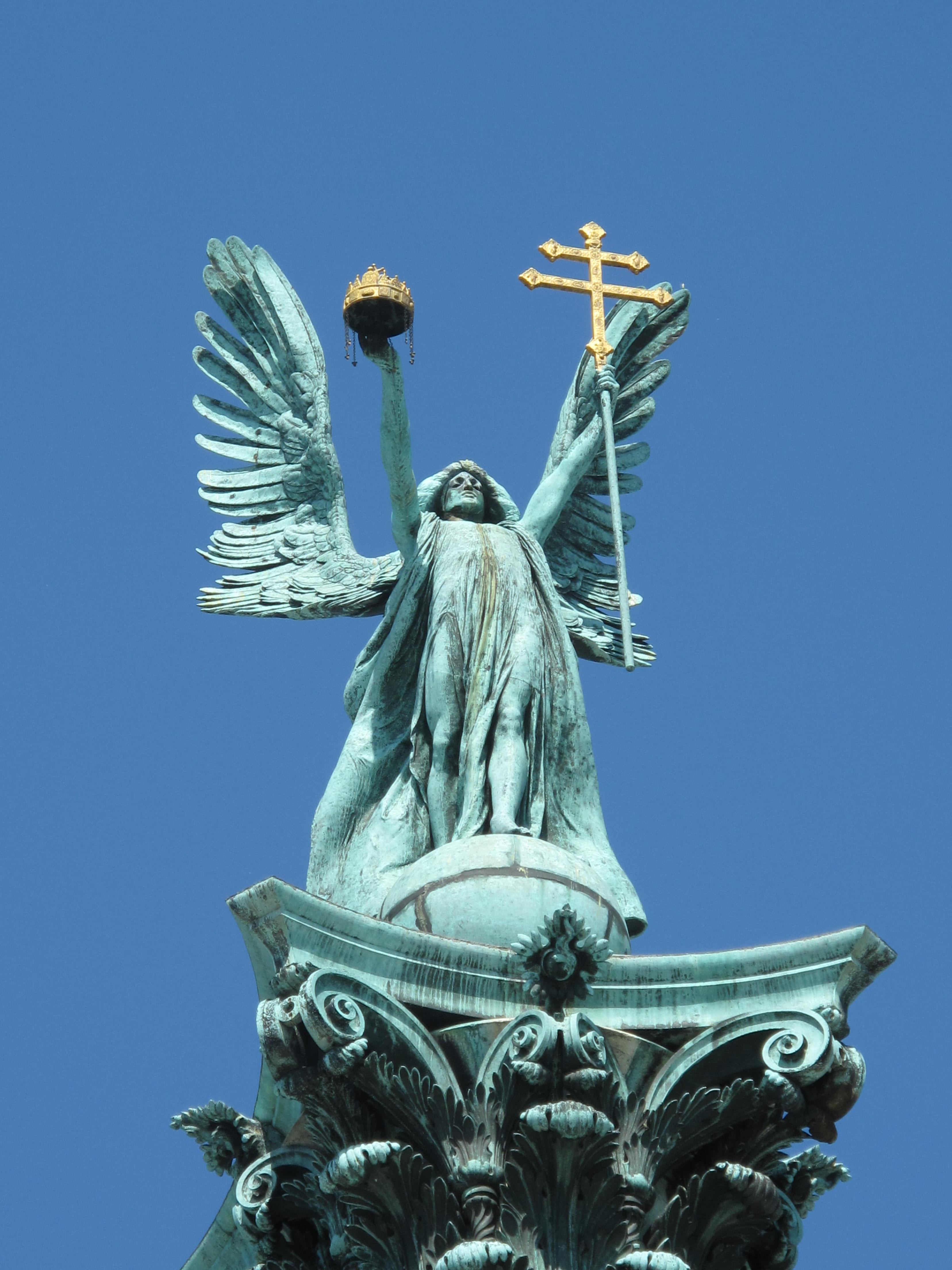 Náměstí Hrdinů, Budapešť